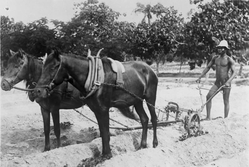 Togo, Pflügen eines Baumwollfeldes Togo, Pflügen eines Baumwollfeldes. [Togo.- Einheimischer Bauer beim Plügen eines Bauwollfeldes.]